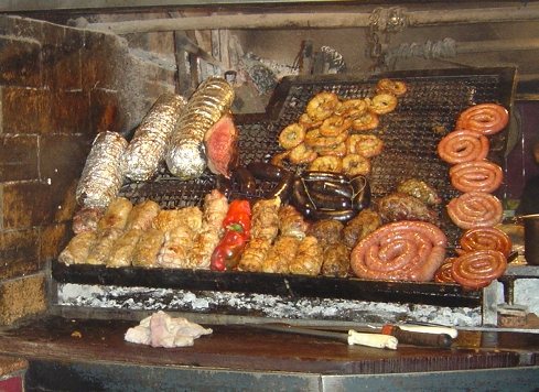 Uruguayan barbecue at Mercado del Puerto, Montevideo